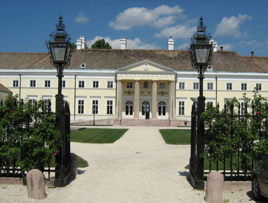 A csákvári Esterházy-kastély.